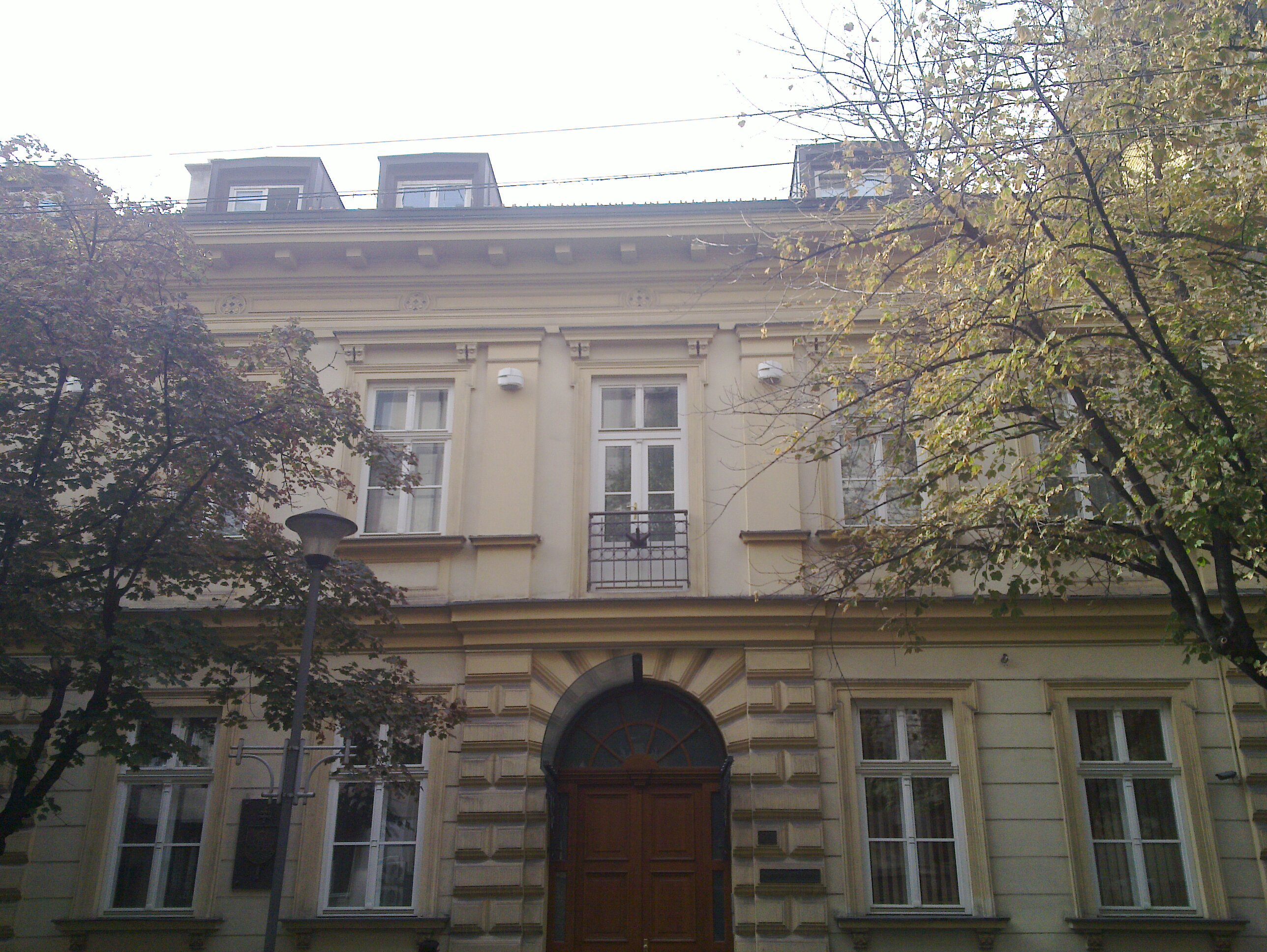 Zgrada u kojoj je sedište Beogradske nadbiskupij -- metropolije i nadbiskupije Katoličke crkve.